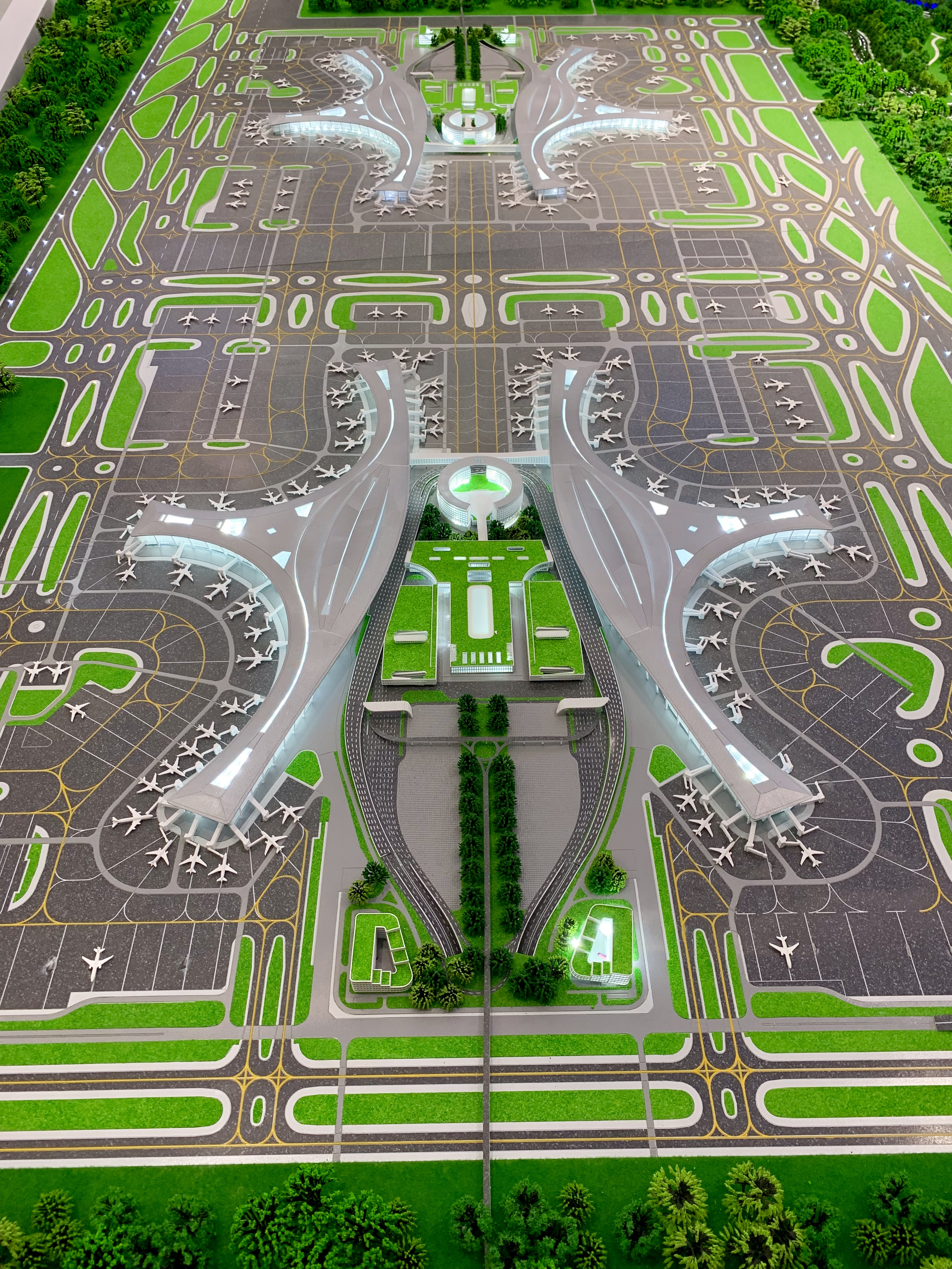 成都市规划局展出的成都天府国际机场航站楼沙盘